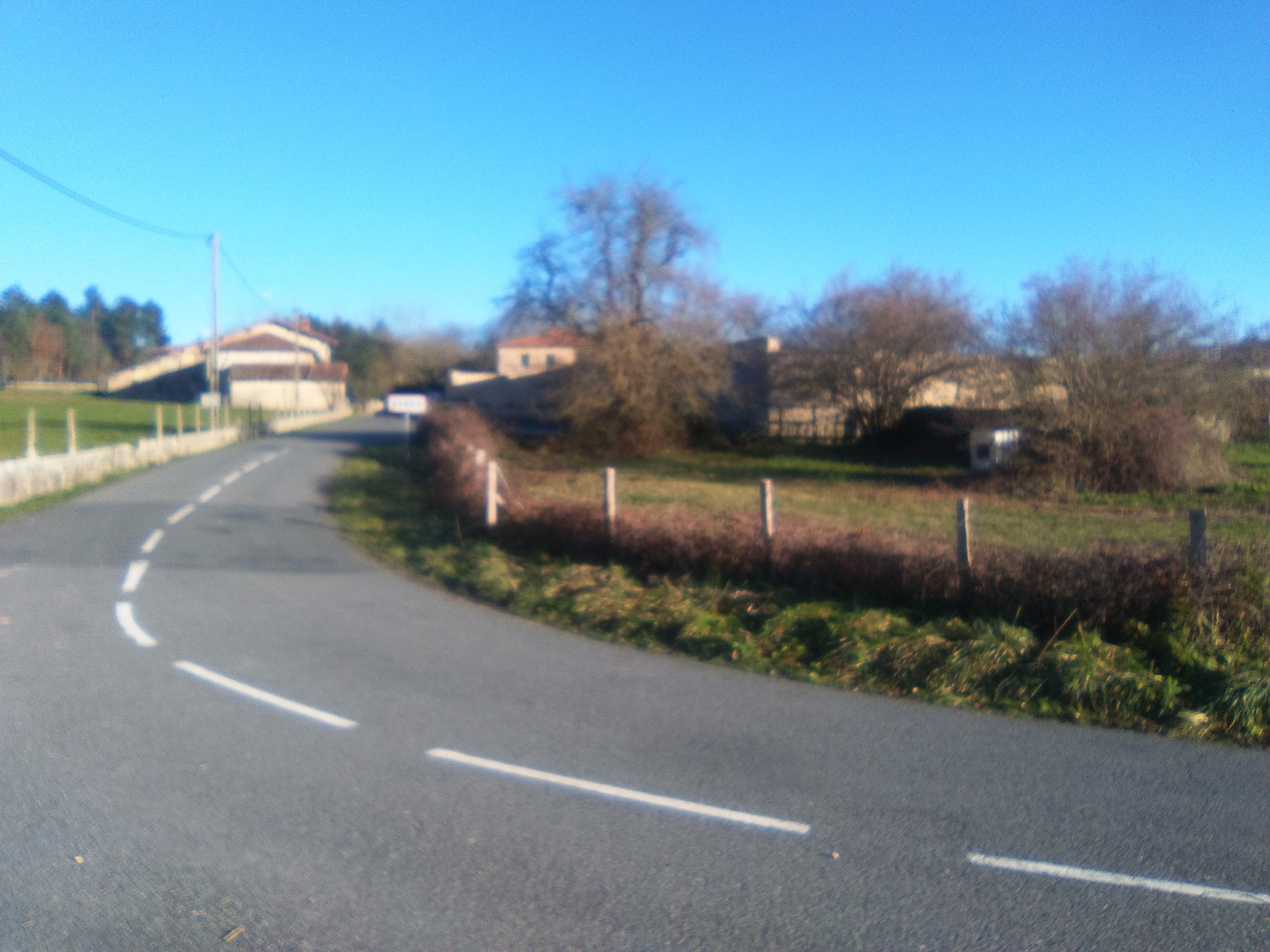 Barria, Araba, Euskal Herria